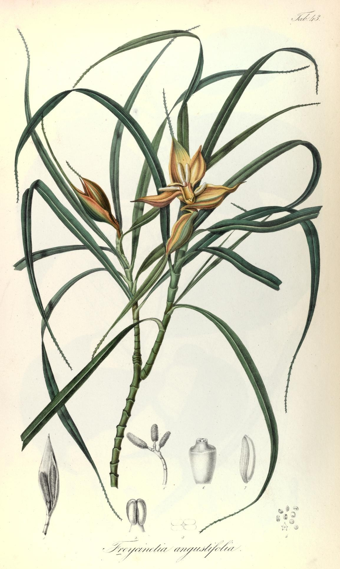 ^/Y'//r////:'///7- a?//y//jf/yrYSf/.